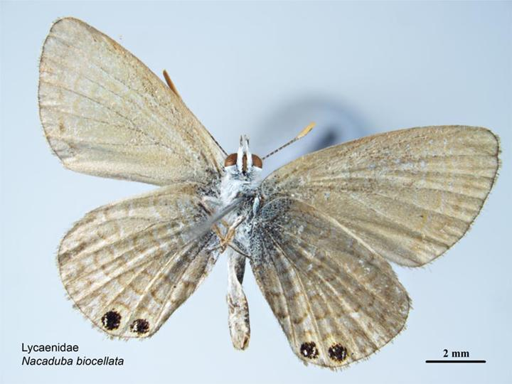 Nacaduba biocelleta, ventral view.